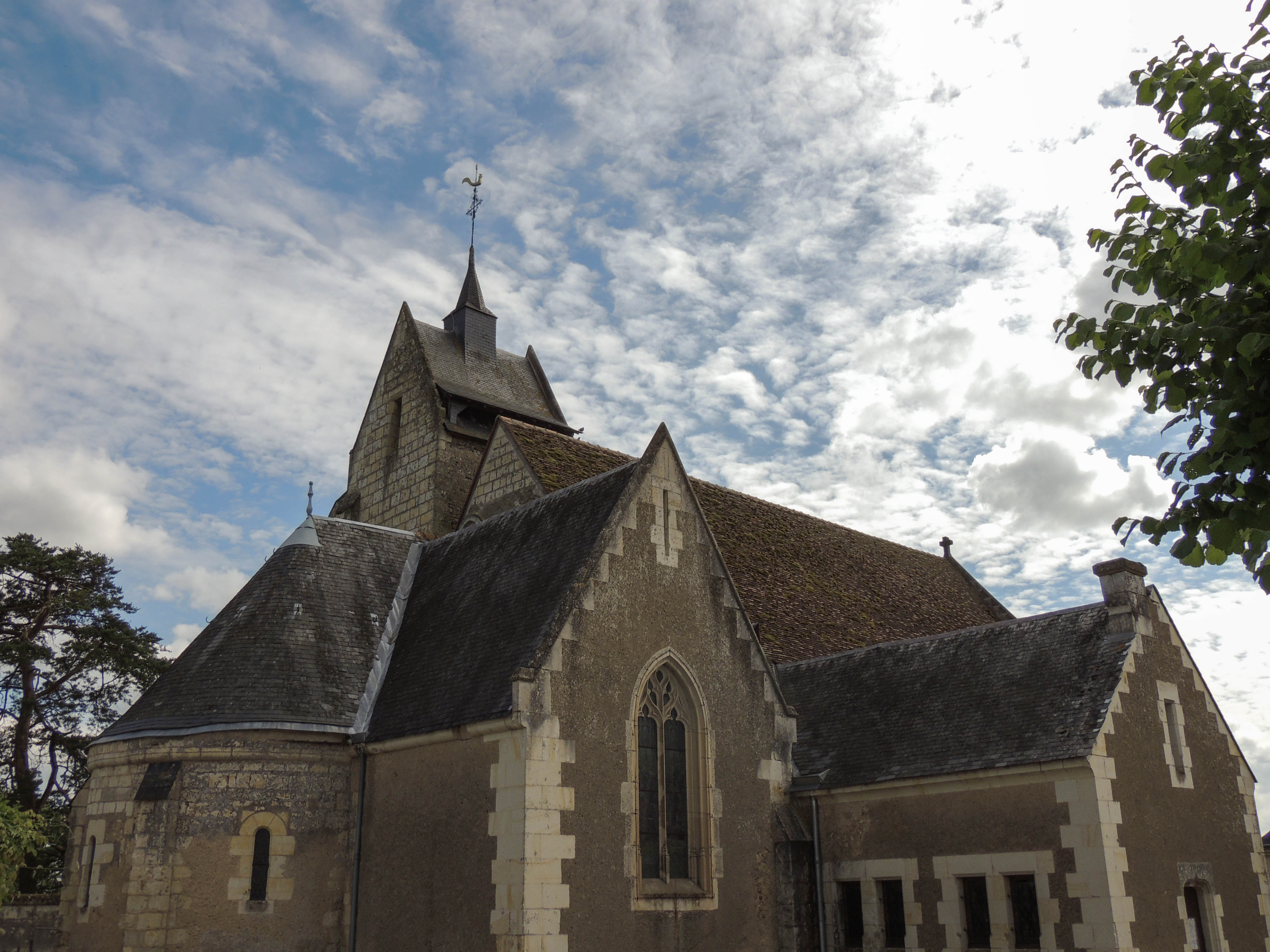 L'église Saint-Julien de Poncé-sur-Loir, vue extérieure.